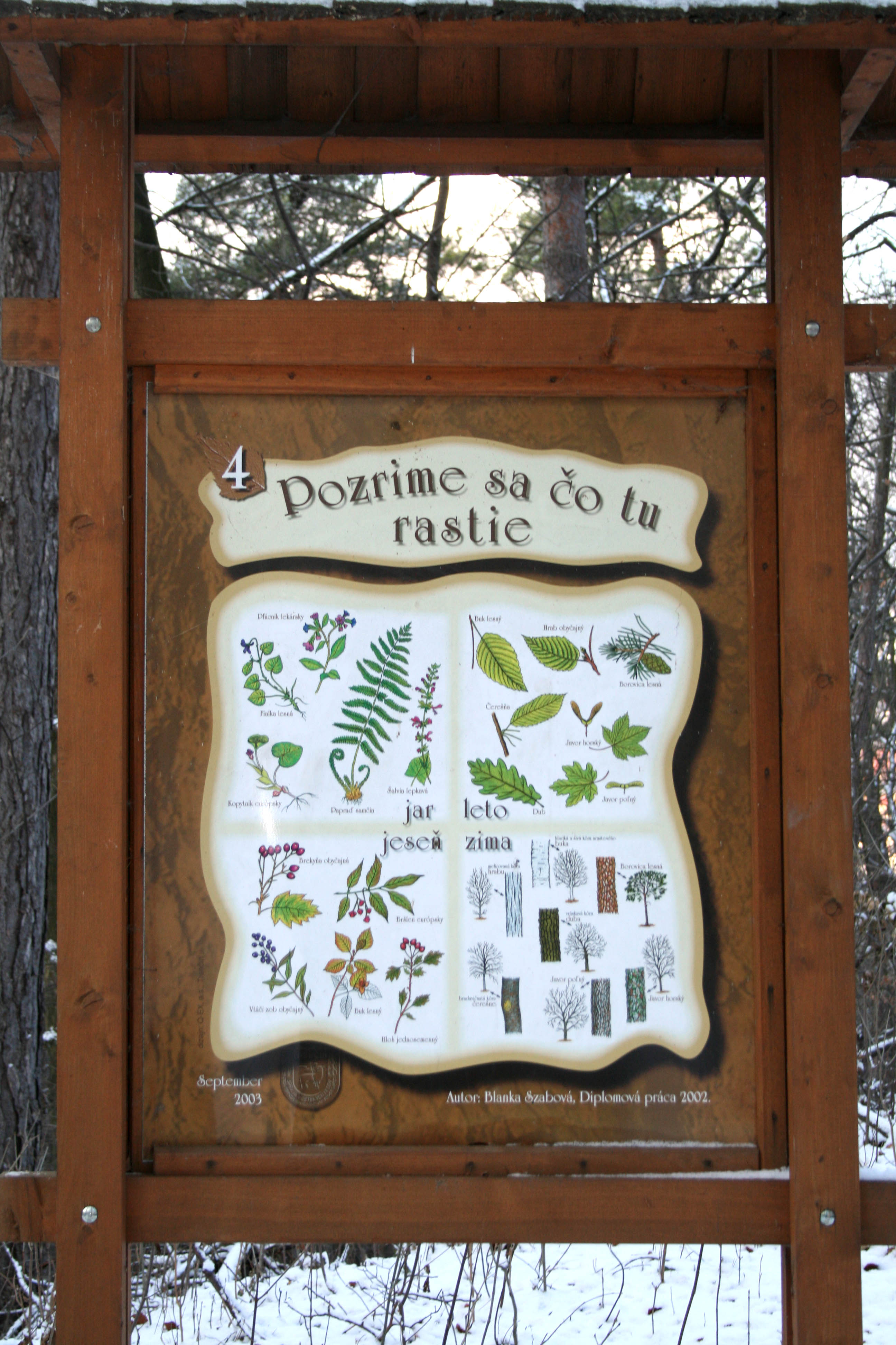 Informačná tabuľa na trenčianskej Brezine